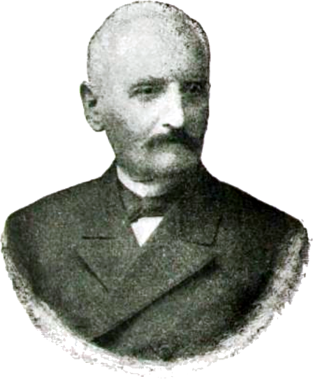 Hornjoserbsce: Wilhelm Józef Bogusławski (1825–1901); pólski prawiznik, stawiznar a pólski přećel Serbow.